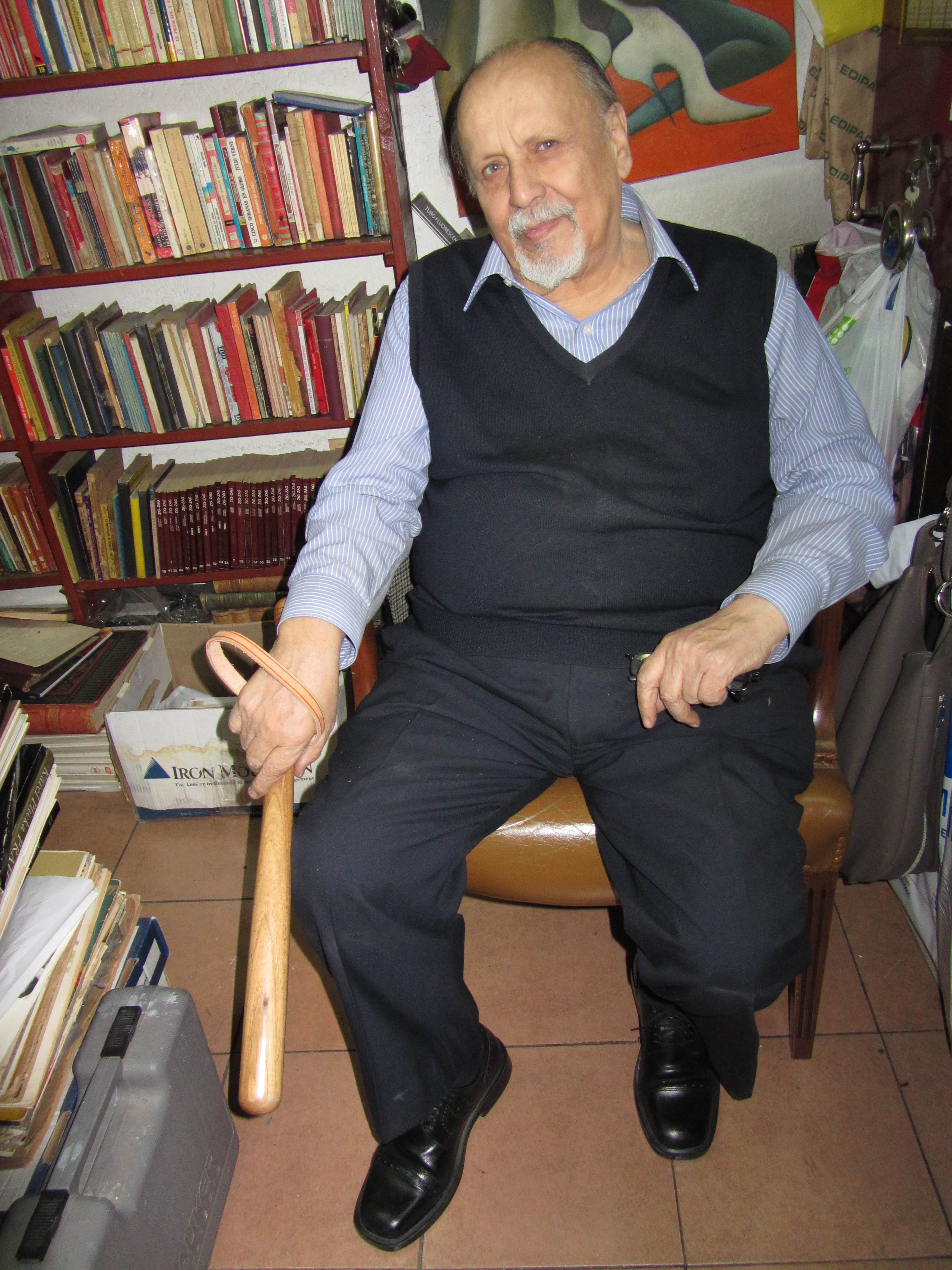 El escritor chileno Luis Rivano en su librería de la calle San Diego, Santiago